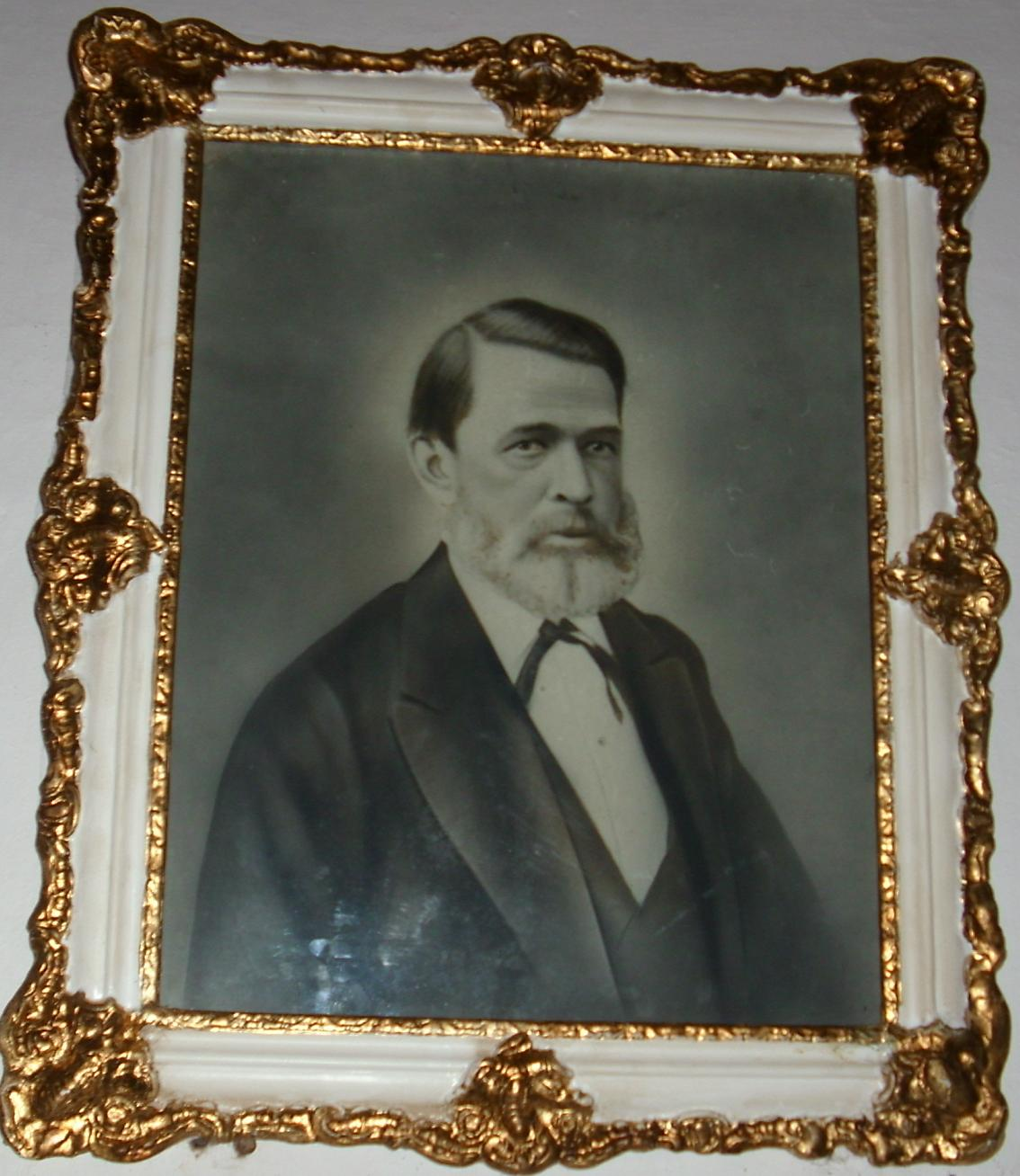 Única imagem do Barão de São Roberto, Quintiliano Alves Ferreira